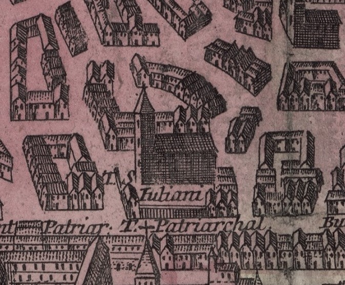 Antiga Igreja de São Julião em Lisboa, antes da sua destruição pelo terramoto de 1755. Visão imaginária do século XVIII (após terramoto) mas baseada numa mapa do século XVI de Georg Braun.